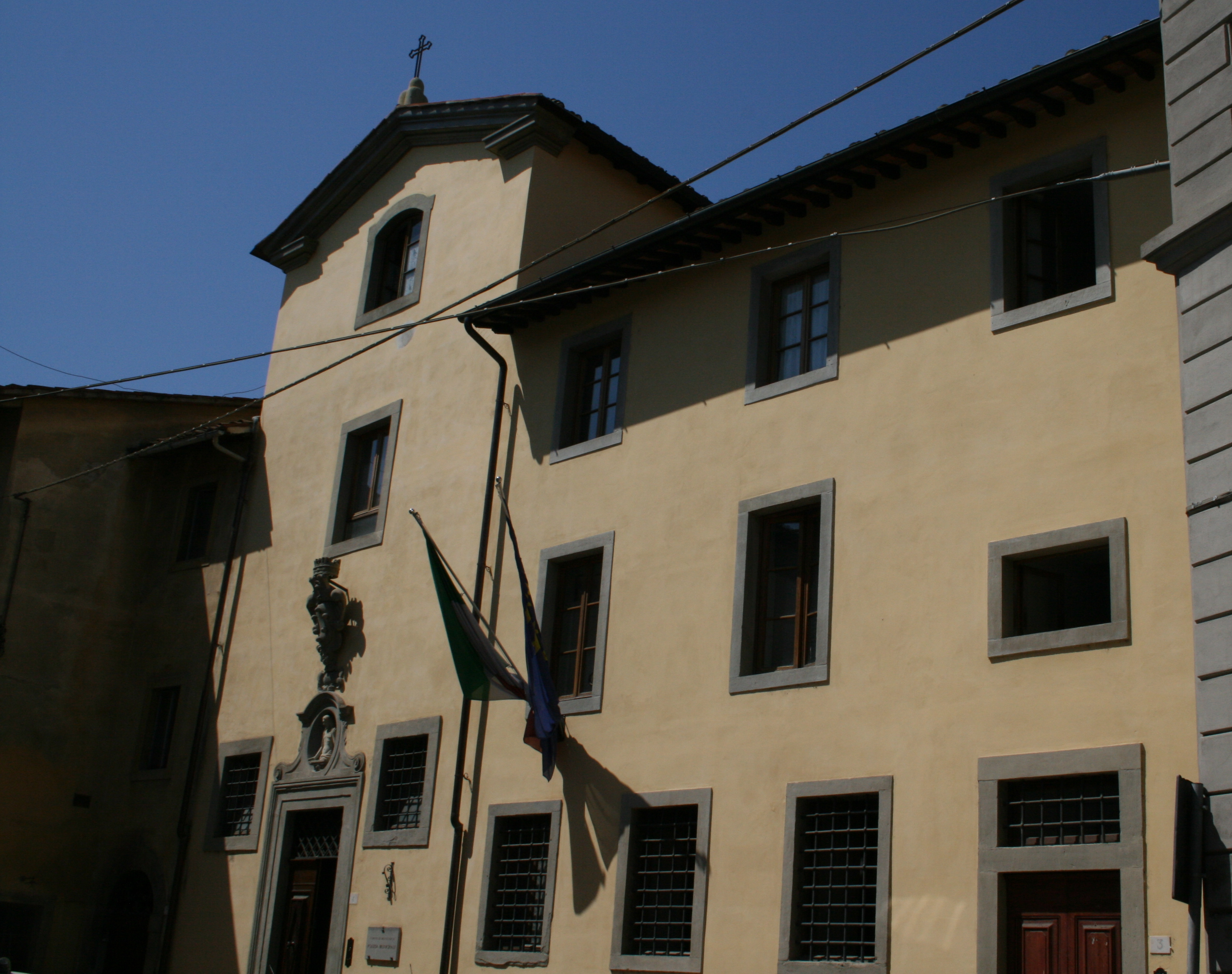 Monte di Pietà - Montevarchi